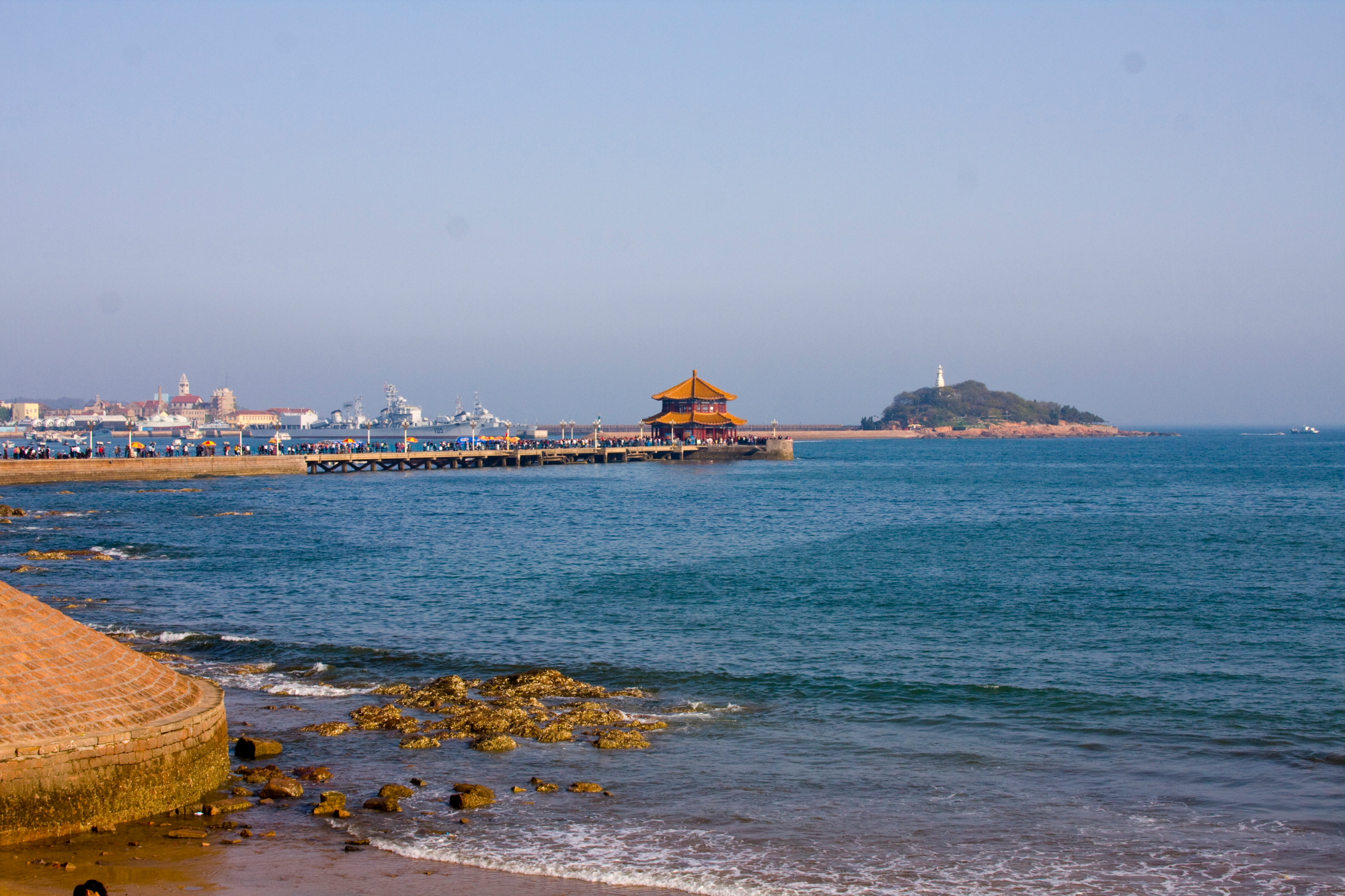 Qingdao Pier, Qingdao, China